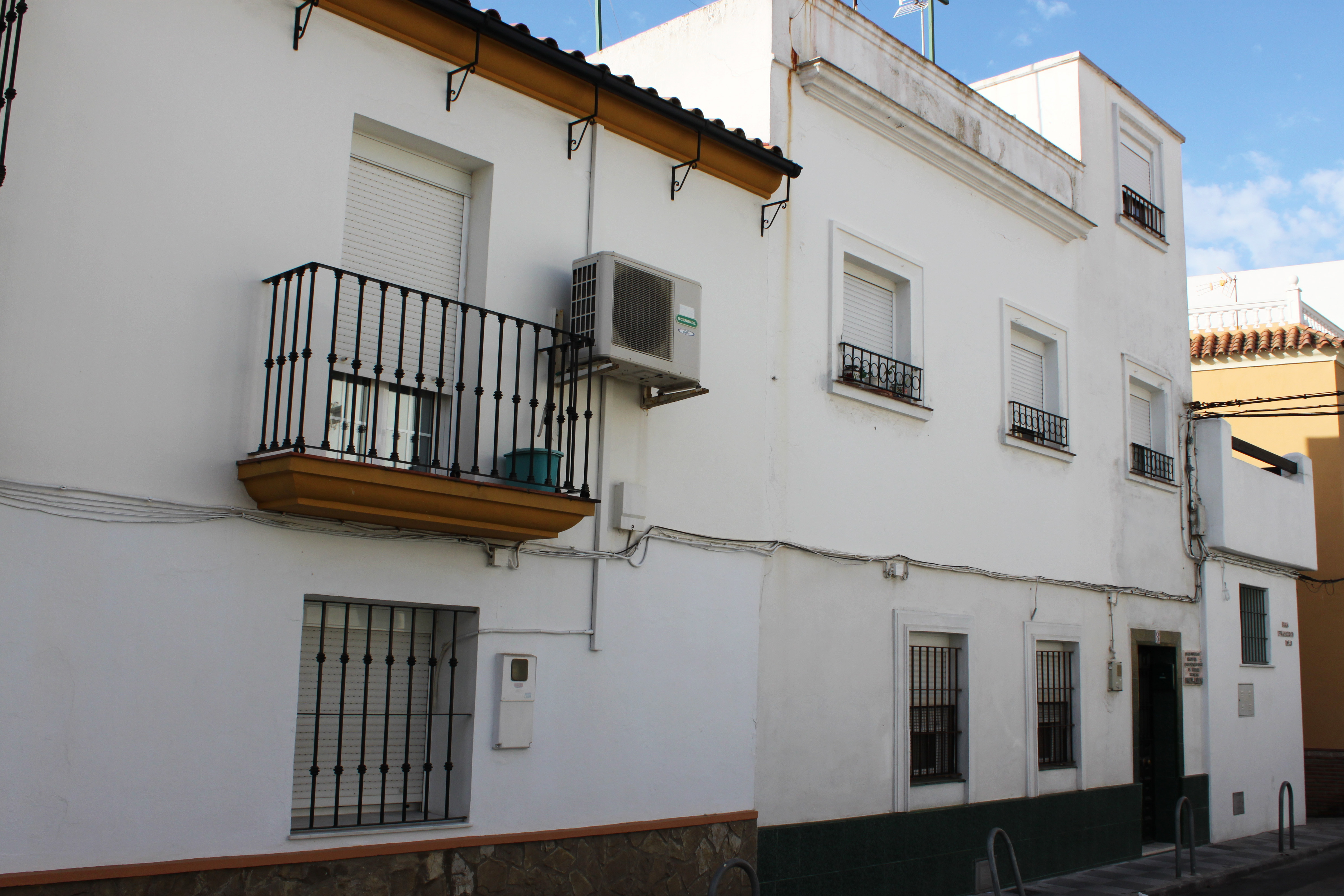 Casa natal de Paco de Lucía en el número 8 de la Calle San Francisco del barrio de Fuentrenueva de Algeciras, Andalucía, España.